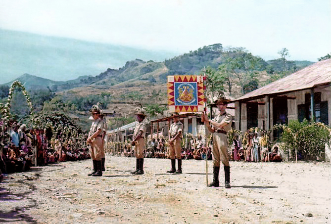 O guião do Esquadrão de Cavalaria 6